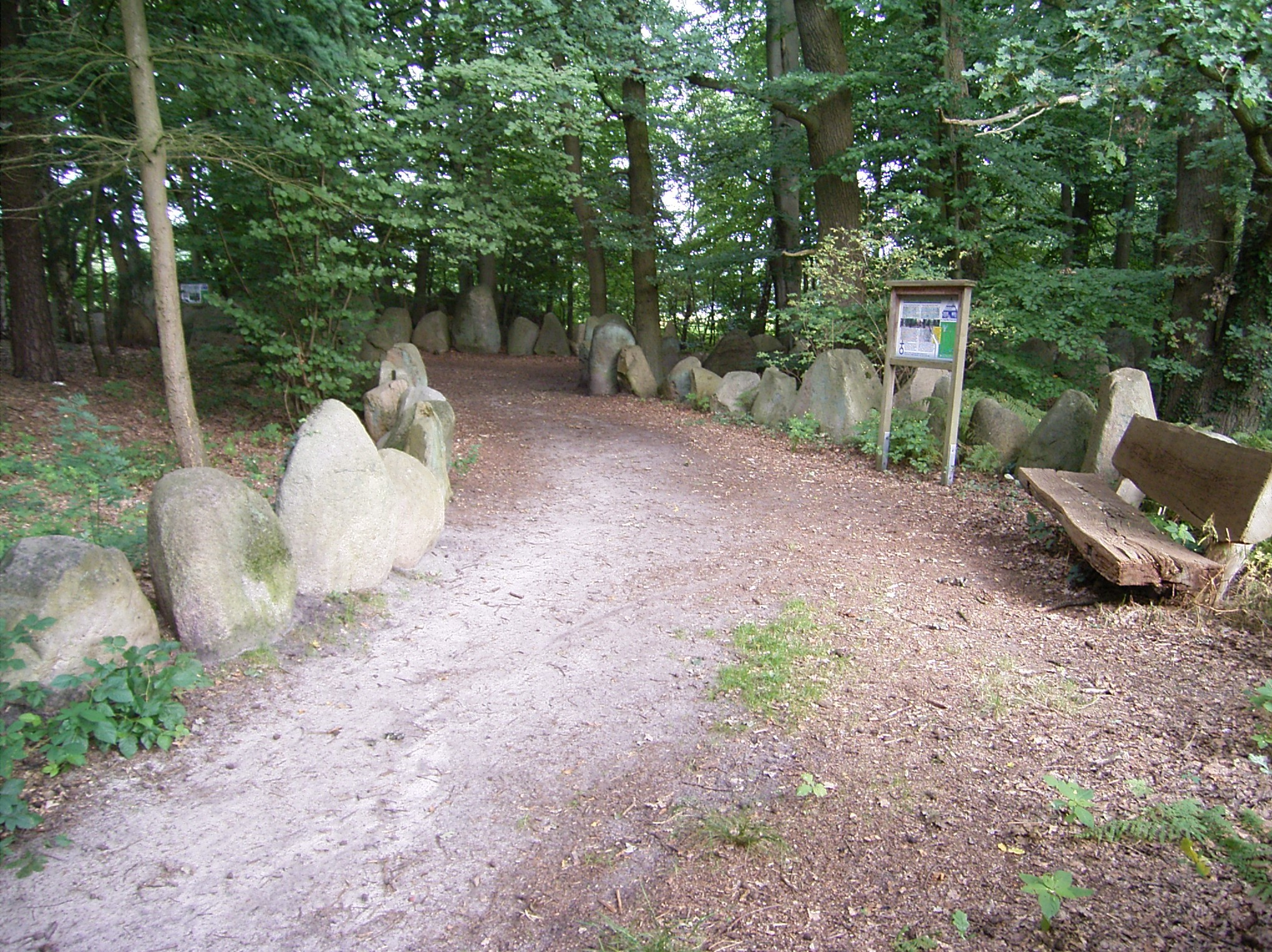 Sachsenhain in Halsmühlen, Ortsteil Dauelsen, Verden (Aller)